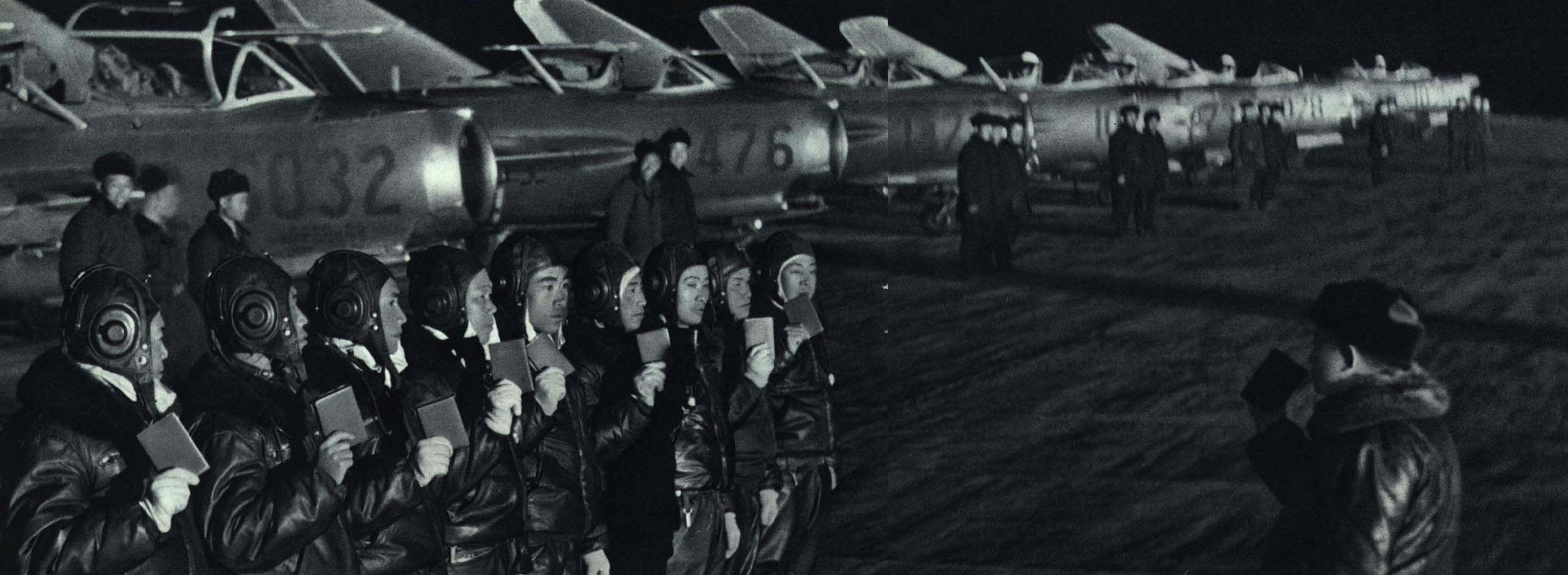 1967-10 1967年解放军空军